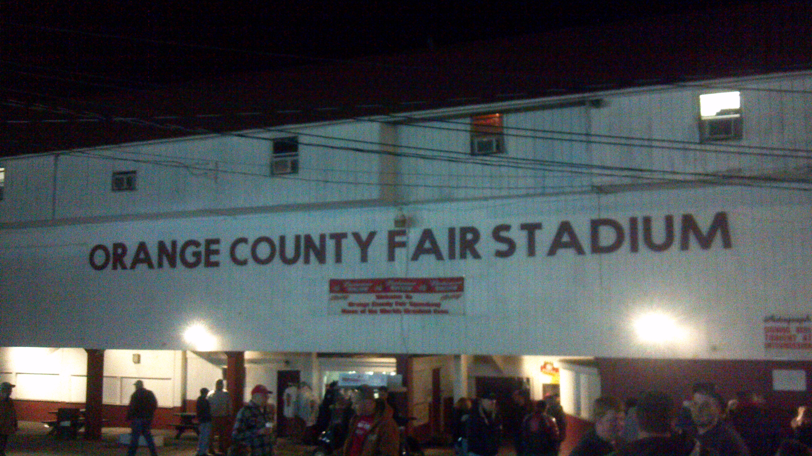 OCFS Grandstand